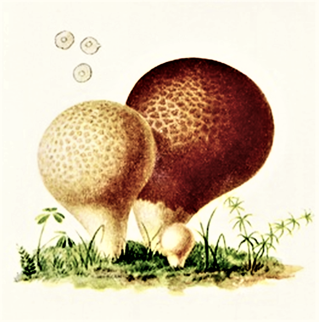 Giacomo Bresadola: Lycoperdon pyriforme (Schaeff., 1774), bei Bresadola piriforme